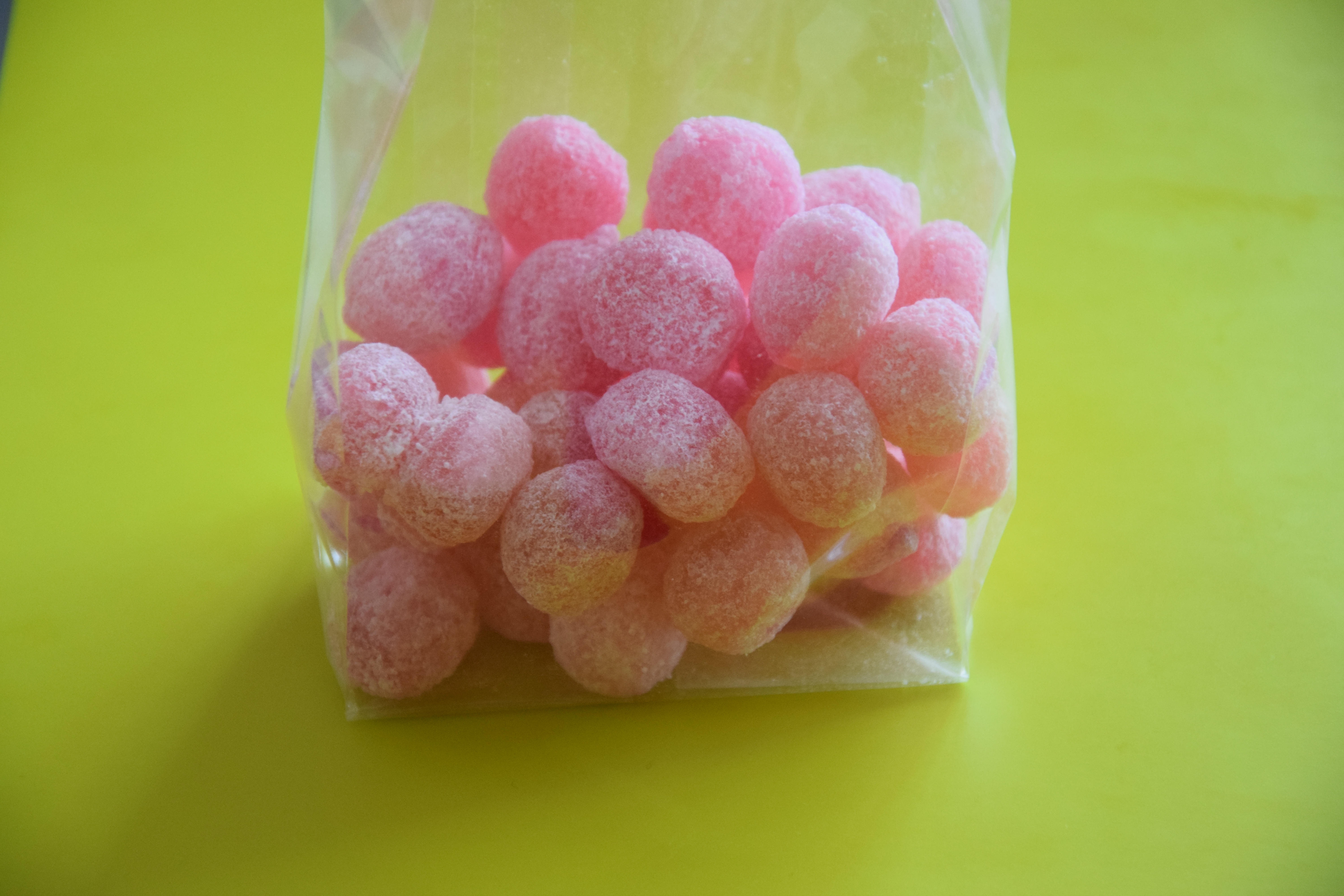 bonbon de liege : couilles de singe bonbon au sucre cuit parfum cerise acidulé